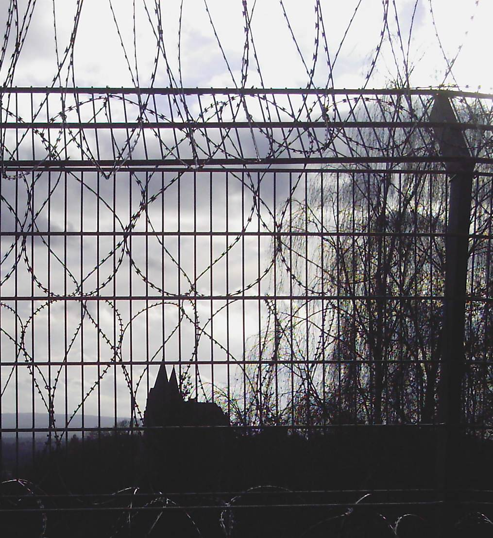 Blick vom Friedhof der Gedenkstätte Hadamar auf das aktuelle Gelände des Psychiatrischen Krankenhauses, im Hintergrund Bischöfliches Konvikt